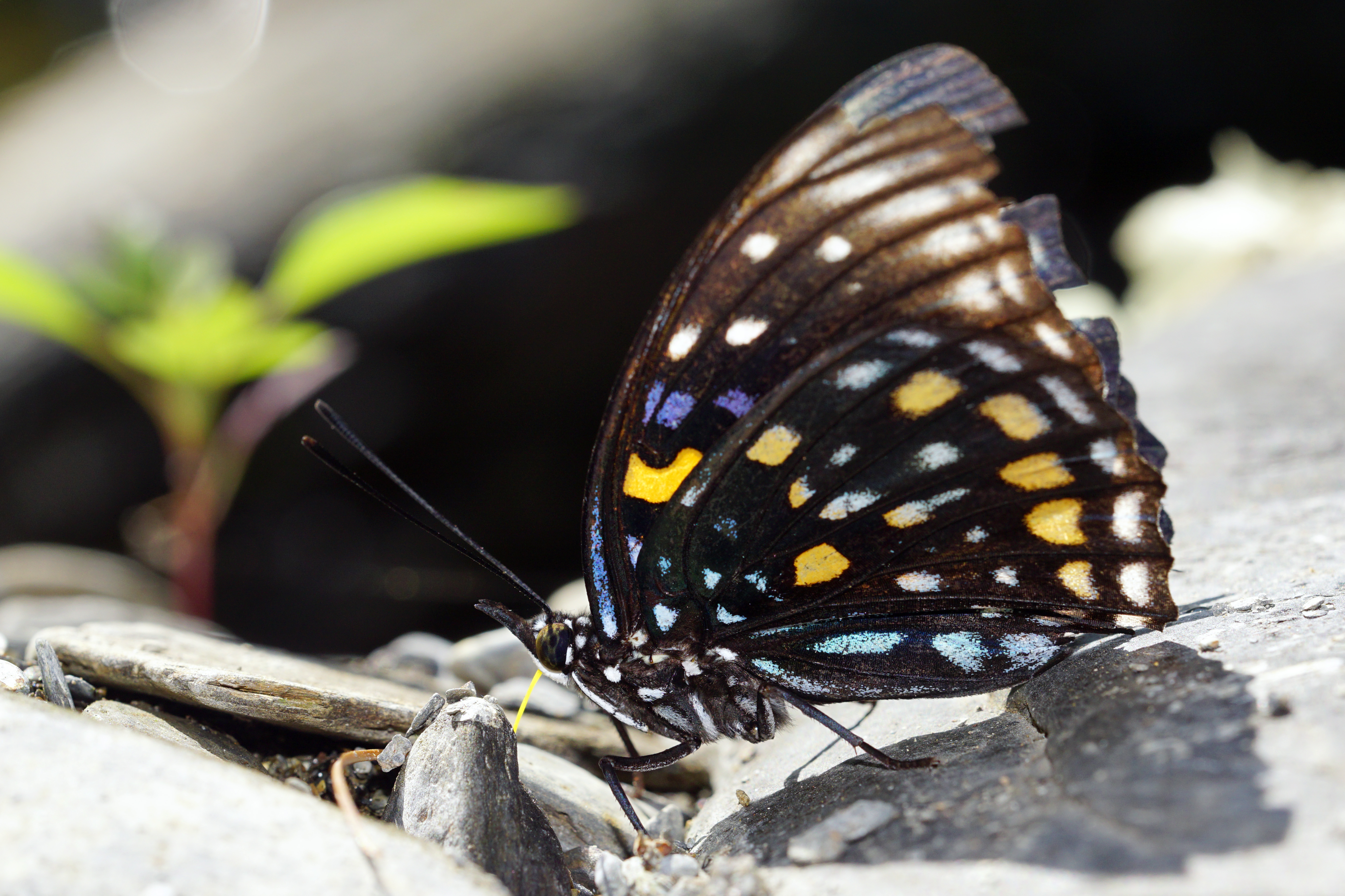 燦蛺蝶 Sephisa chandra androdamas